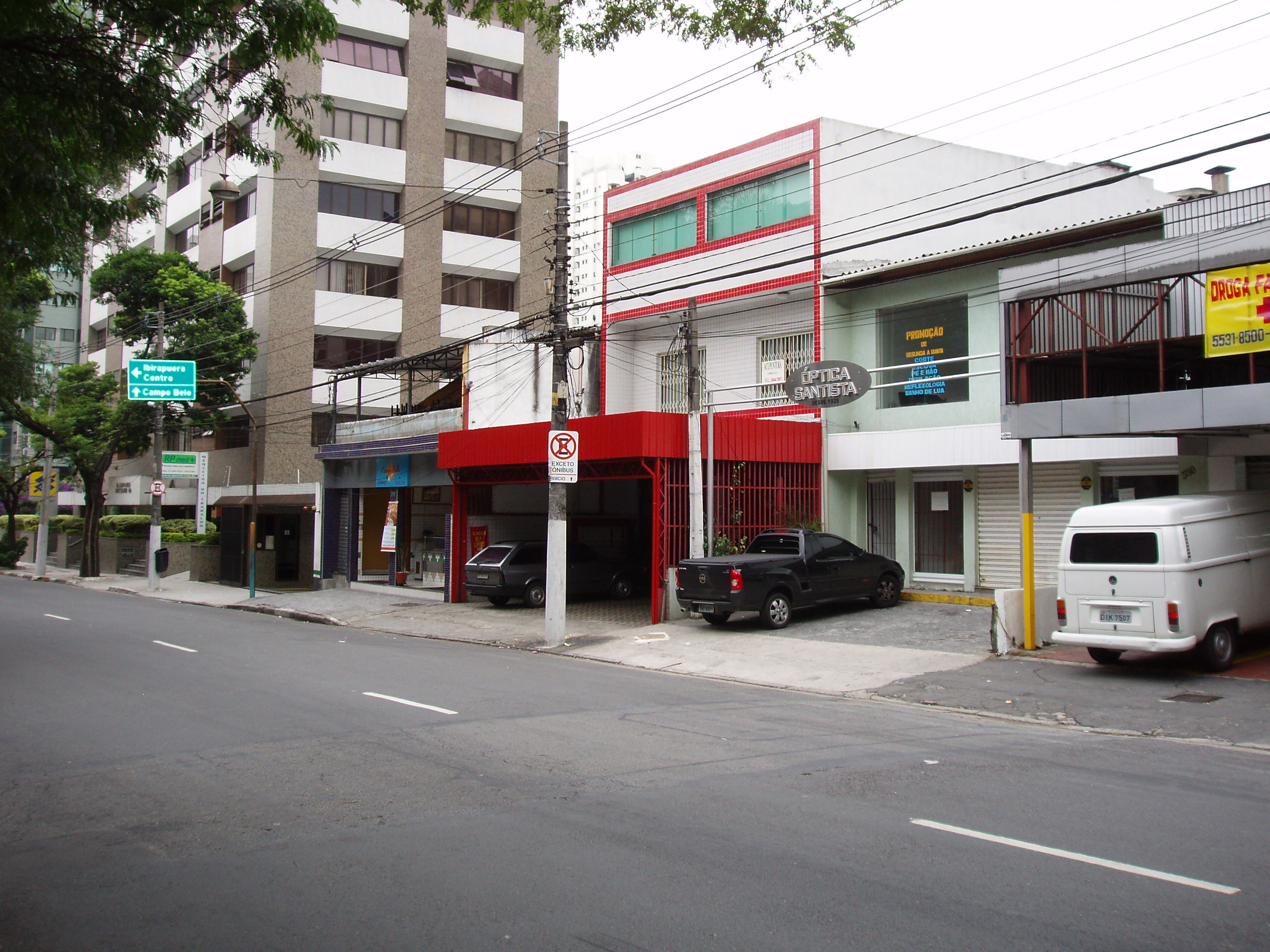 São Paulo-SP, Brasil, Rua Vieira de Morais